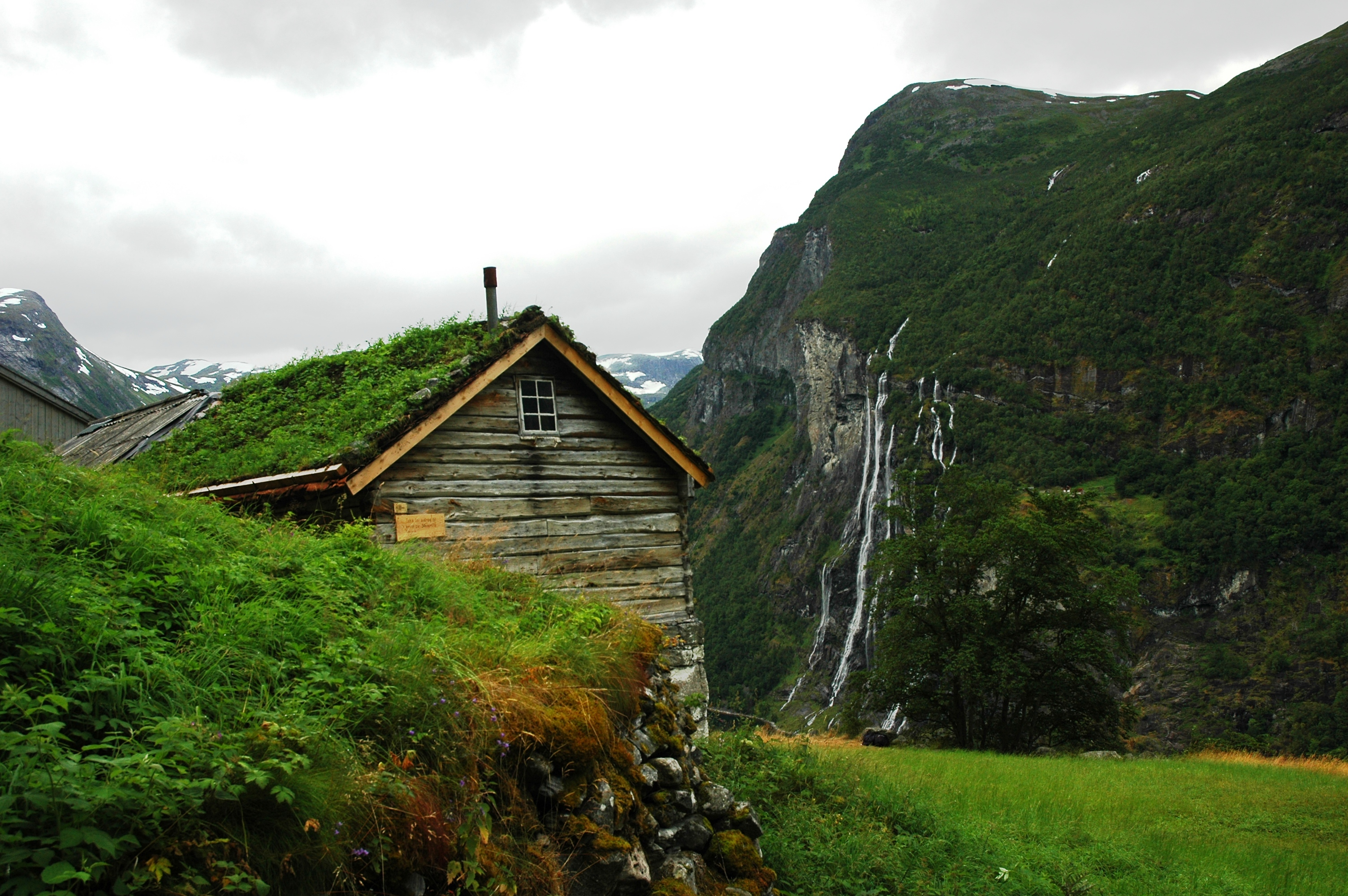 Skageflå i framgrunnen, fossen Dei sju systrene og garden Knivsflå på andre sida av Geirangerfjorden.